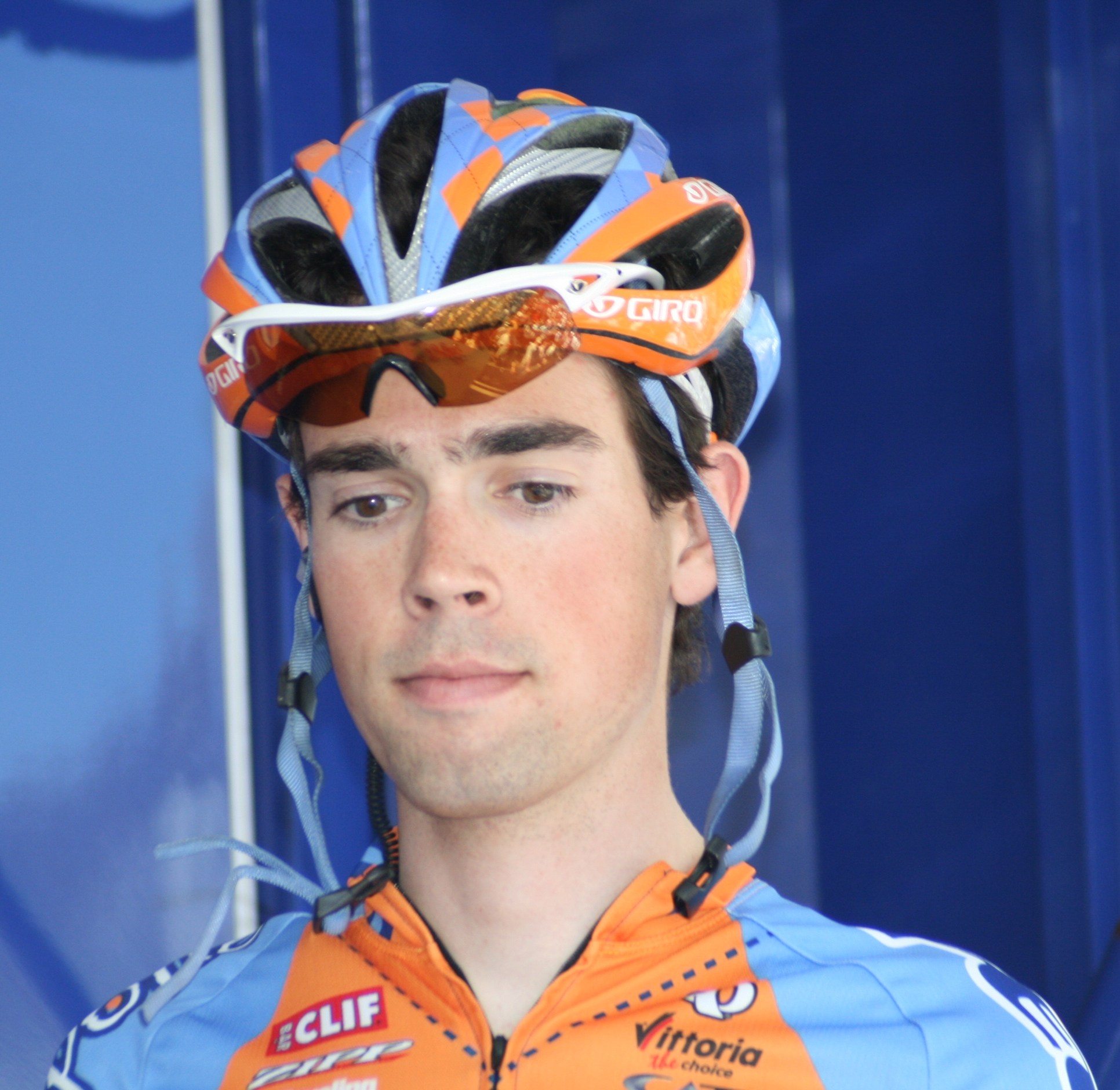 Blake Caldwell, aux Quatre jours de Dunkerque 2008